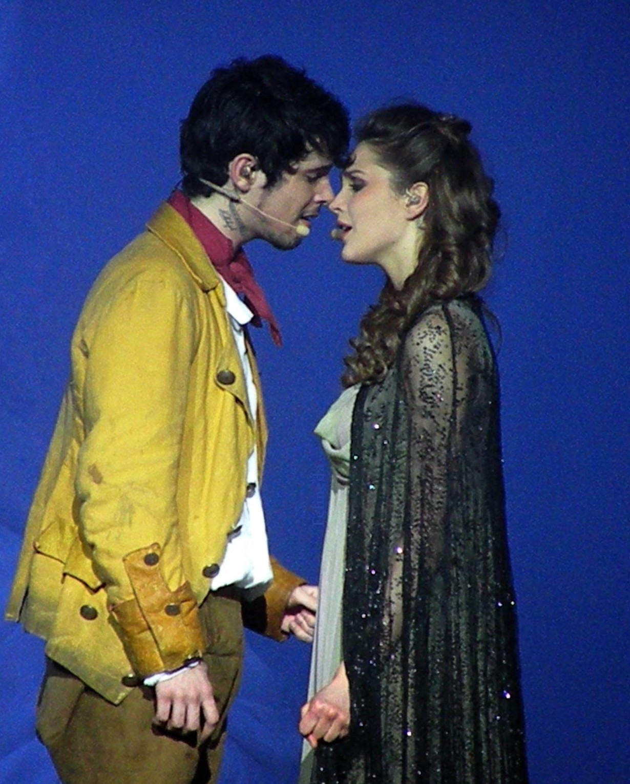 Camille Lou et Louis Delort, Les Amants de la Bastille Crédit photo : Félineda Farfelue